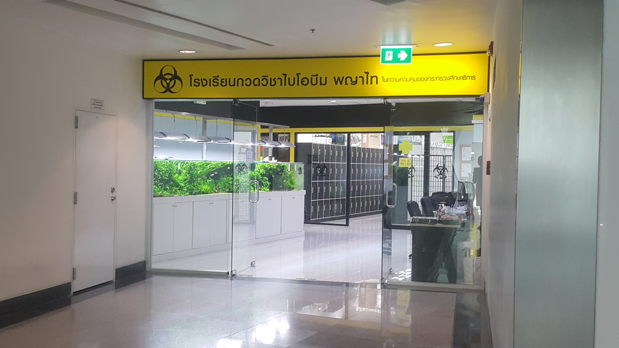 สถาบันกวดวิชาพิชญ์ศึกษา (ไบโอบีม) สาขาพญาไท อาคารวรรณสรณ์